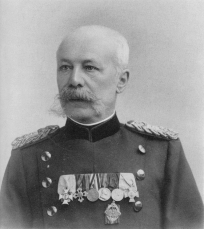 Karl Renner (1833–1913), Feuerwehrkommandant in Heilbronn. Abbildung aus Egid Fleck (Bearb.): Gestalten aus dem Brandschutz- und Feuerwehrwesen in Baden und in Württemberg, Stuttgart 1963, Tafelteil.